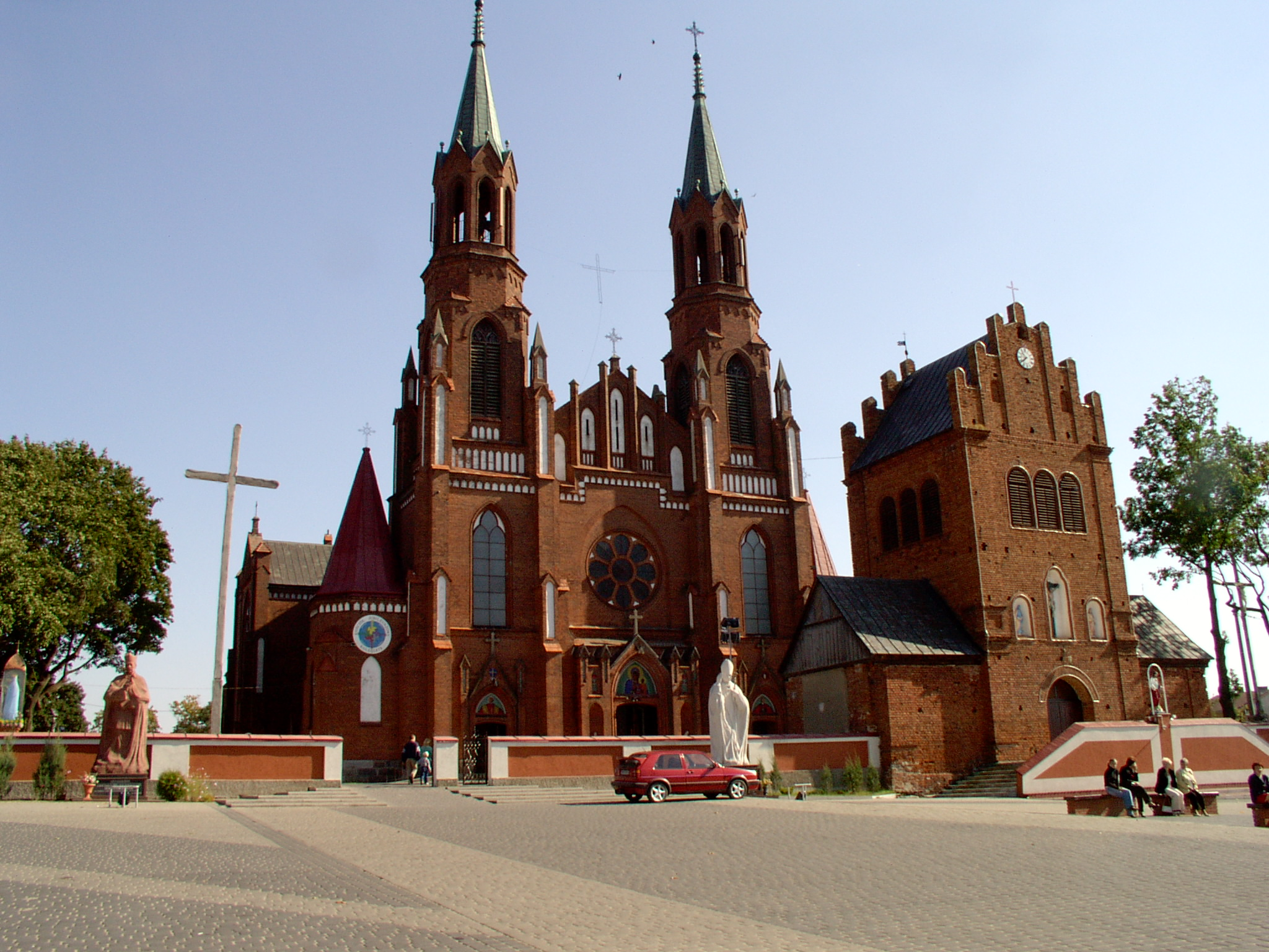 Kościół Świętej Trójcy w Myszyńcu (zabytek nr rejestr. A-467)